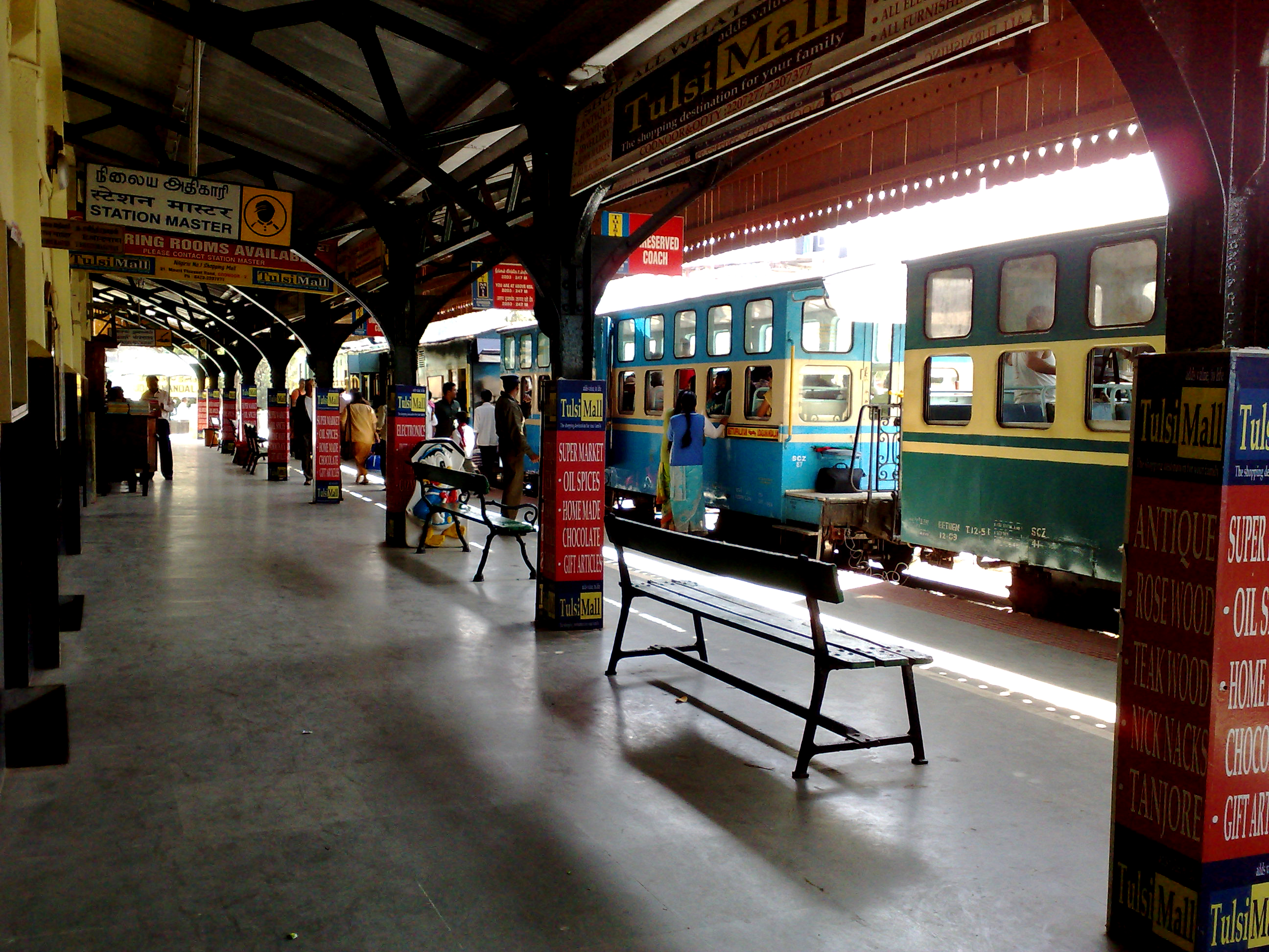 ഊട്ടി റെയിൽവേ സ്റ്റേഷൻ